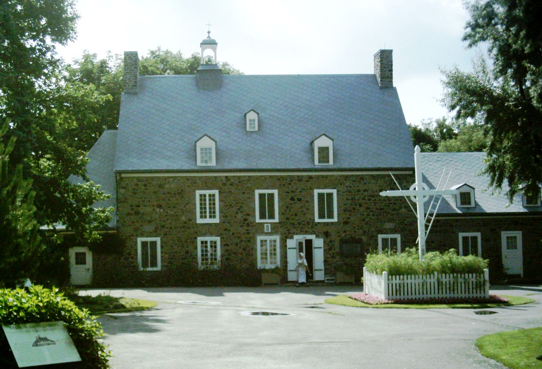 La Maison Saint-Gabriel dans le quartier Pointe Saint-Charles à Montréal